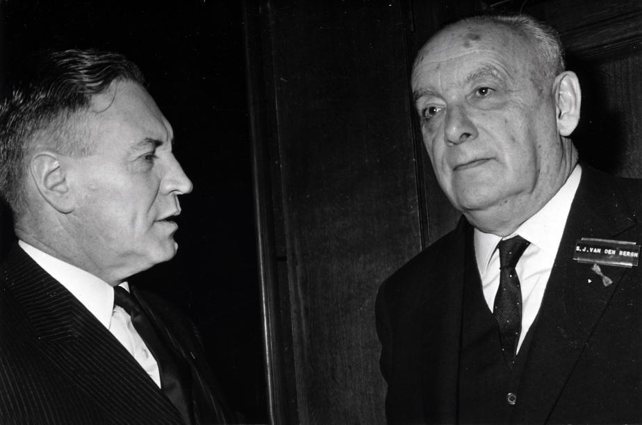 Staatssecretaris van Sociale Zaken J.F.G.M de Meijer(links)( KVP) en Eerste Kamerlid S. van der Bergh. Amsterdam, Nederland, 24 maart 1965.